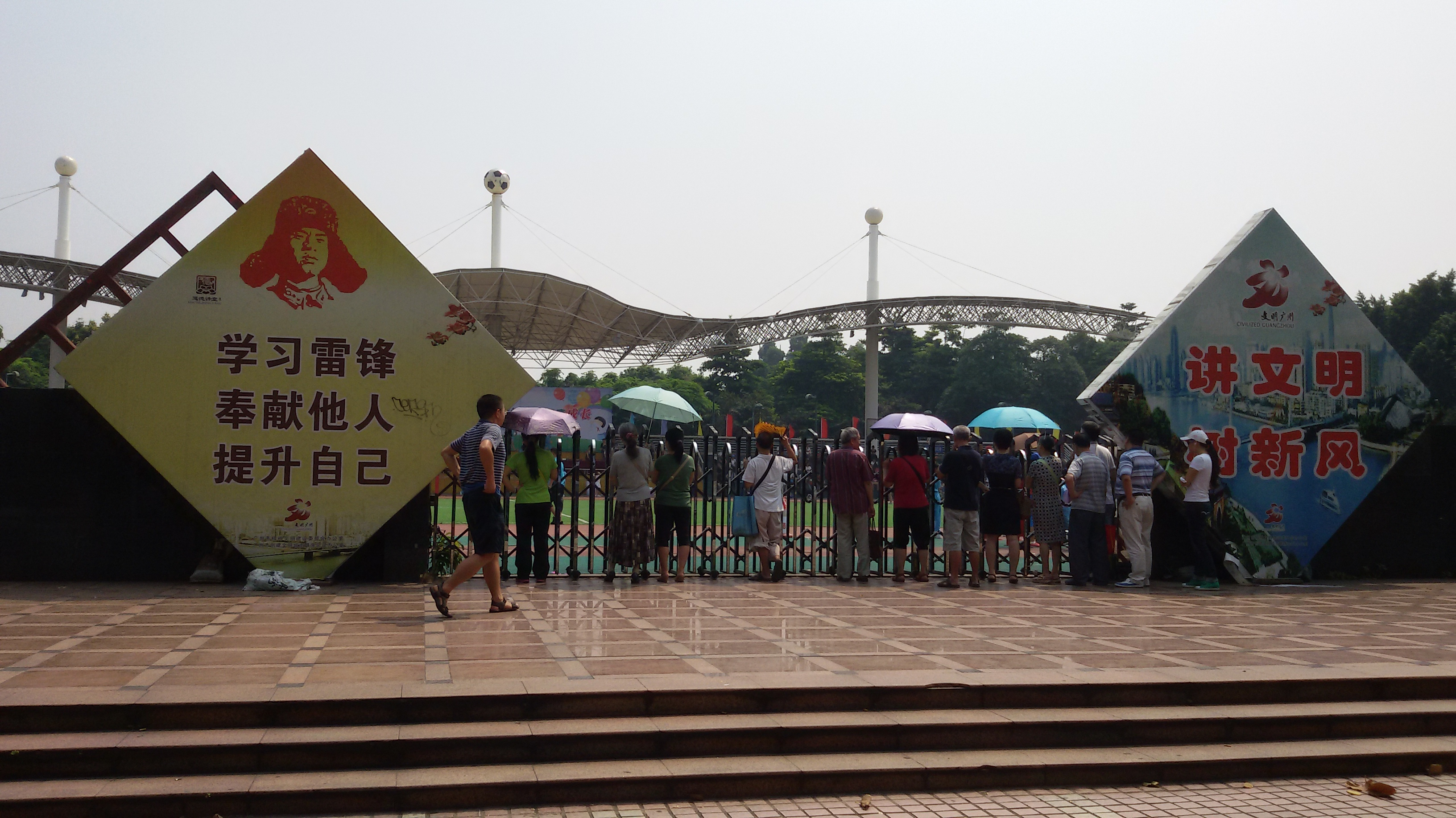 粵語: 越秀區東山體育場